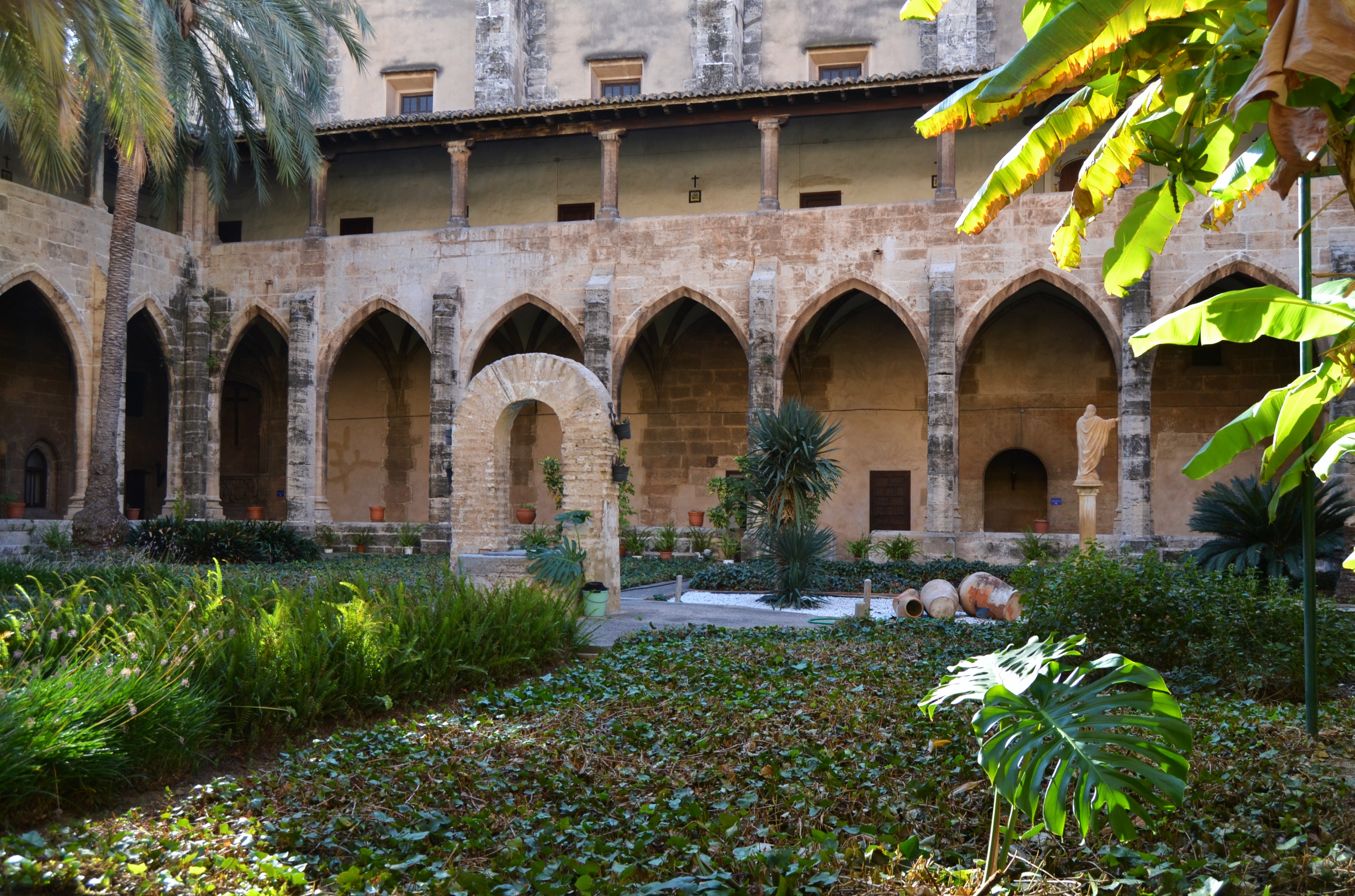 Claustre del monestir de la Trinitat, València.